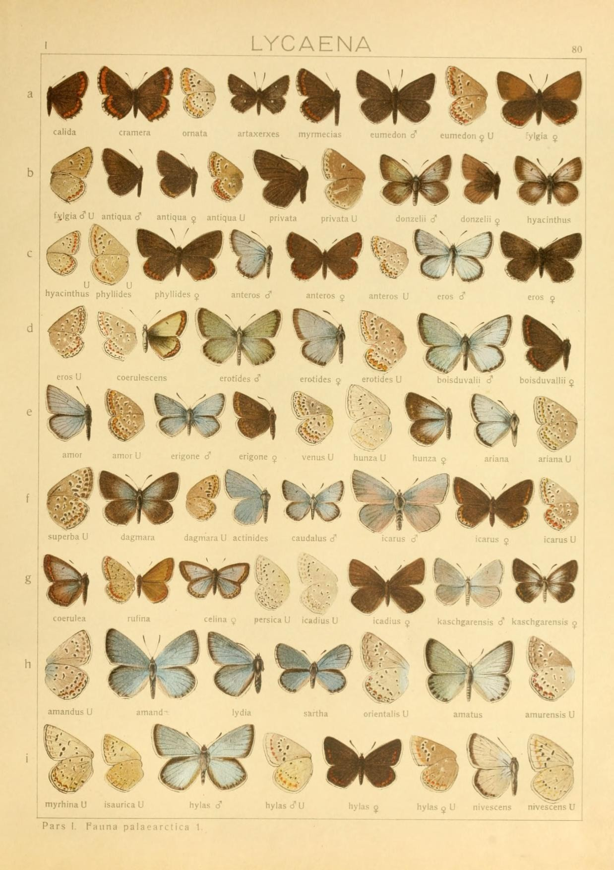 LYCAENA calida cramera ornata artaxerxes myntiecias eumedon tf eumedon g U -ylgia § '"'"■""' :ntiqua ^ antiqua Li pri\..M iinvat; . oun/.cii! ^, nyacinthus anteros 5 anteros U eros d" eros j eros U coerulescens erotides o' eroiides 5 L.l,^uu^alii boisduvallii 2 hyacinthus phyllides phyllides ^ anteros c? anteros 5 anteros U eros d" % amor amor U erigone .? erigone ^ superba U dagmara dagmara U actinides caudalus d" icarus o" icarus 5 icarus U %%4 sartha orient. ills I, iVis amurensis U ^a" Wl^ myrnin.ii- .-,!..■.;. nyias 3 n.is 1 hylas ^ U ni nivi;scens v Pars I. Fauna palaearctica 1.